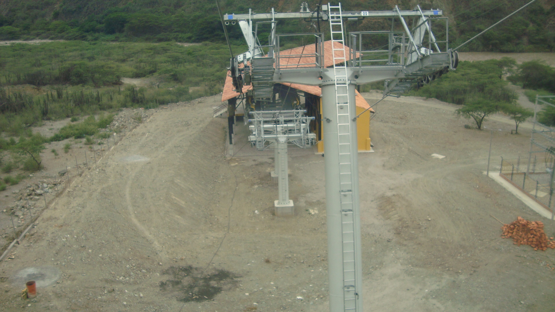 Estacion del Rio